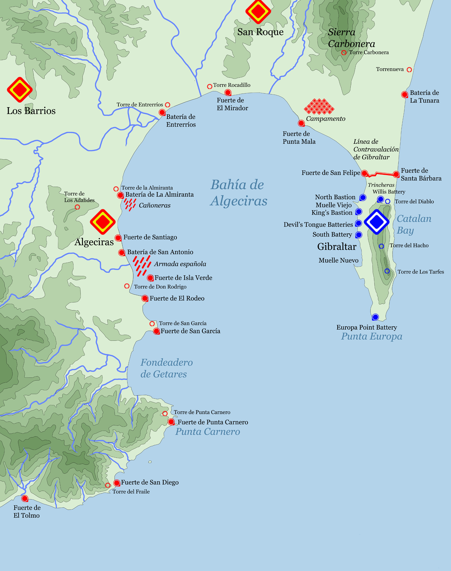 Situación de las defensas costeras de la Bahía de Algeciras durante el siglo XVIII.